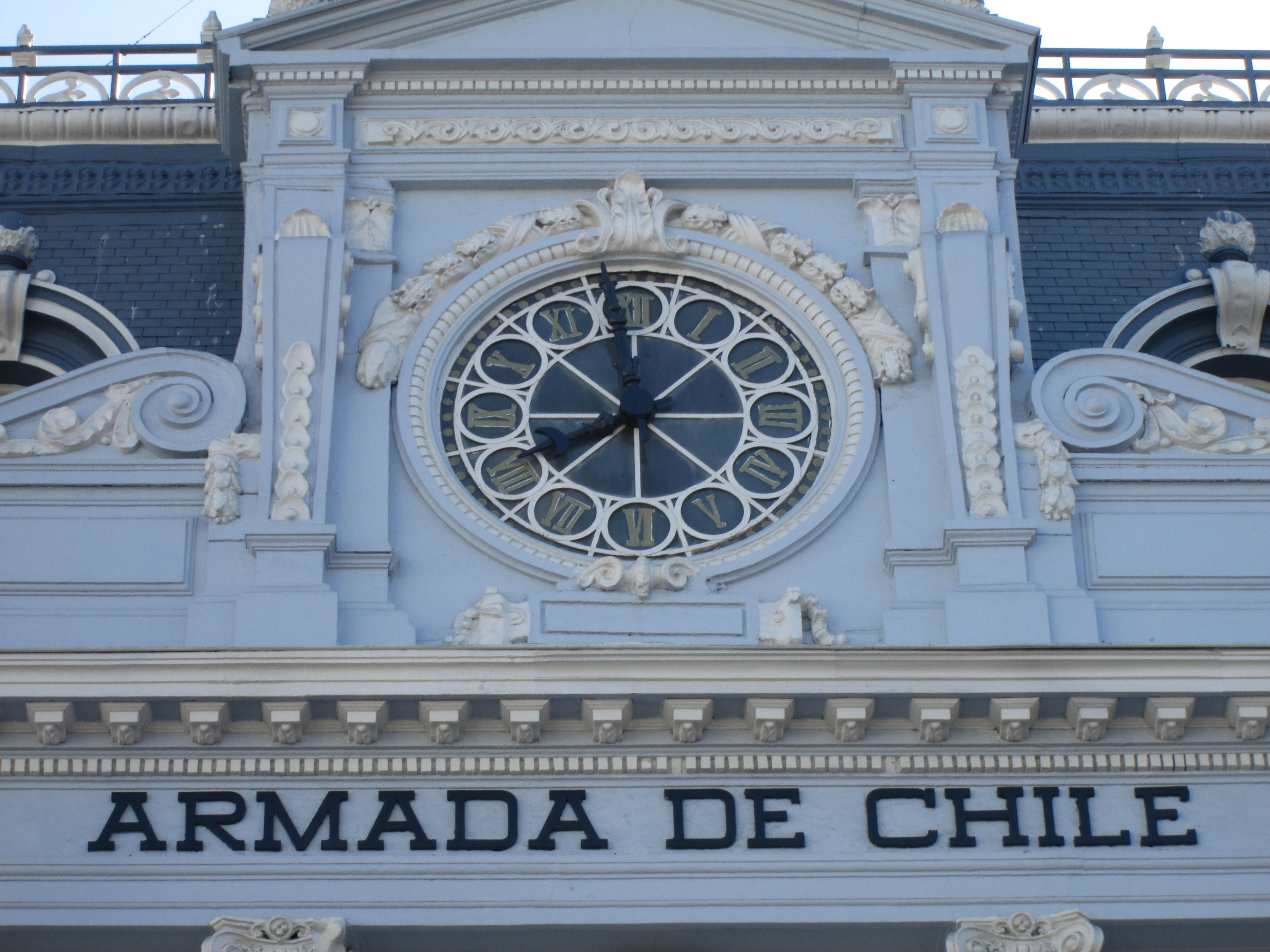 Reloj ubicado en la fachada del edificio de la ex-Intendencia de Valparaíso, actualmente ocupado por la Comandancia en jefe de La Armada de Chile.